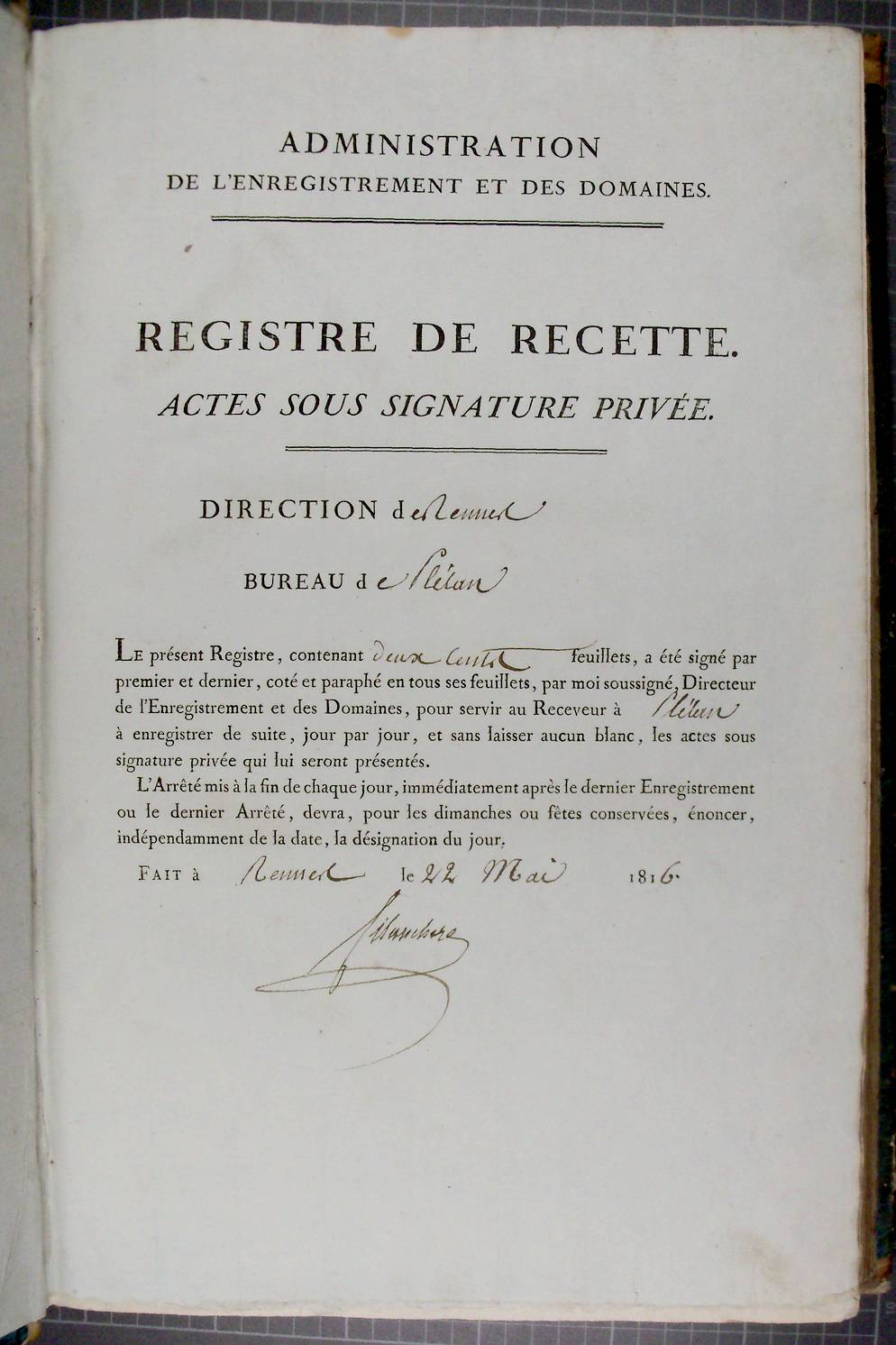 Première page d'un registre de recettes des taxes sur les actes sous signature privée (Enregistrement) dans le bureau de Plélan-le-Grand, direction de Rennes, en Bretagne, France. Cote 3Q 27 239 des Archives départementales d'Ille-et-Vilaine.